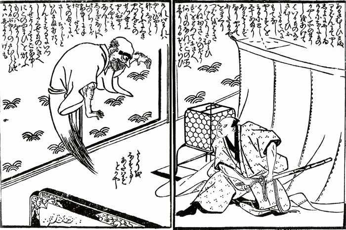 Yakubyō-gami (疫病神) from the Kaidan-Ushimitsu-no-kane (怪談夜更鐘)